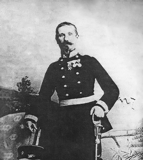 Почасни генерал Иполит Монден (1811—1900) Аутор: Непознат Извор: Милић Милићевић; Љубодраг Поповић (1998). Министри војни Кнежевнине и Краљевине Србије. Војноиздавачки завод. стр. 37. ISBN 86-335-0035-3.